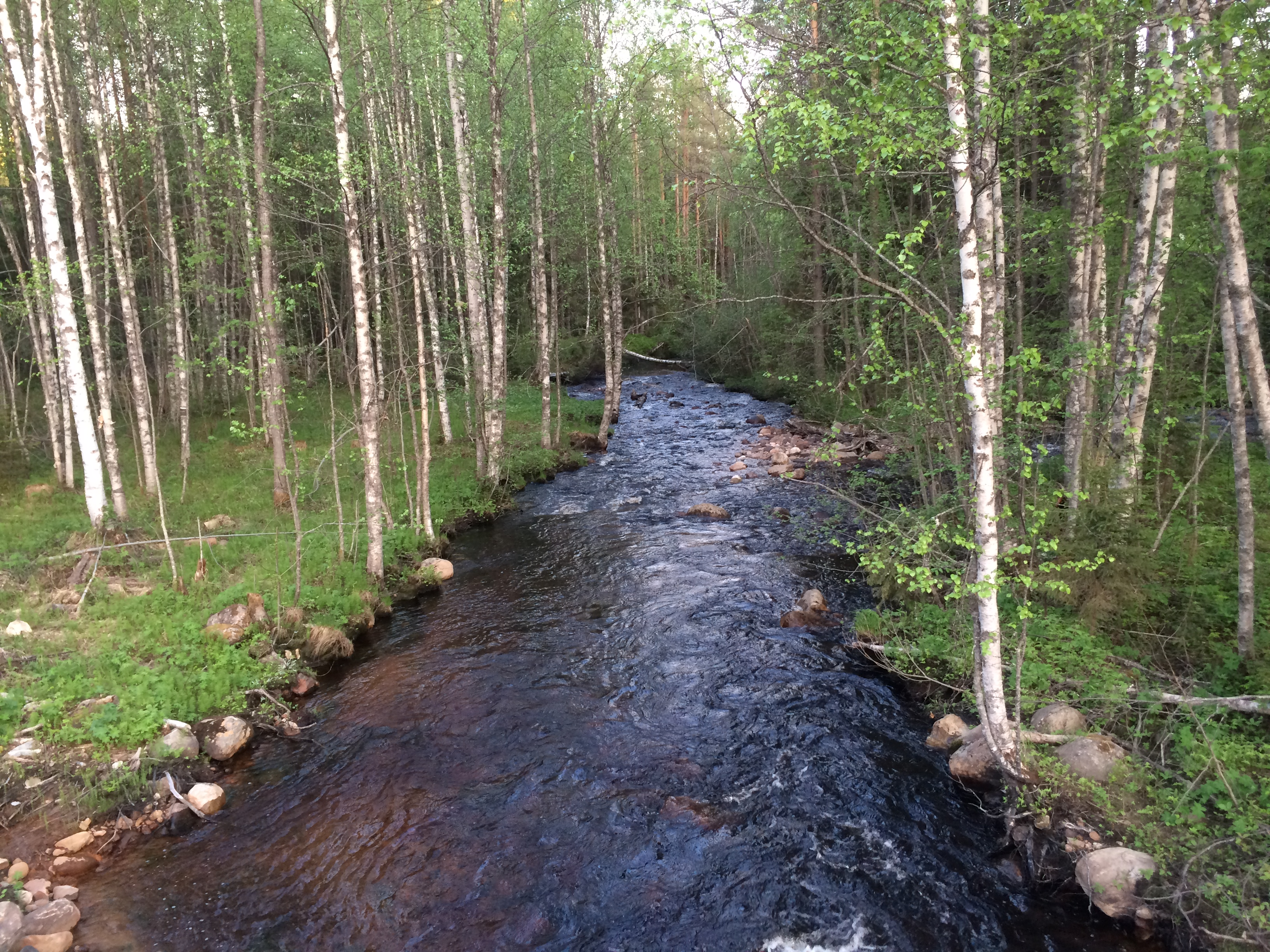 река Кис-Кис 2